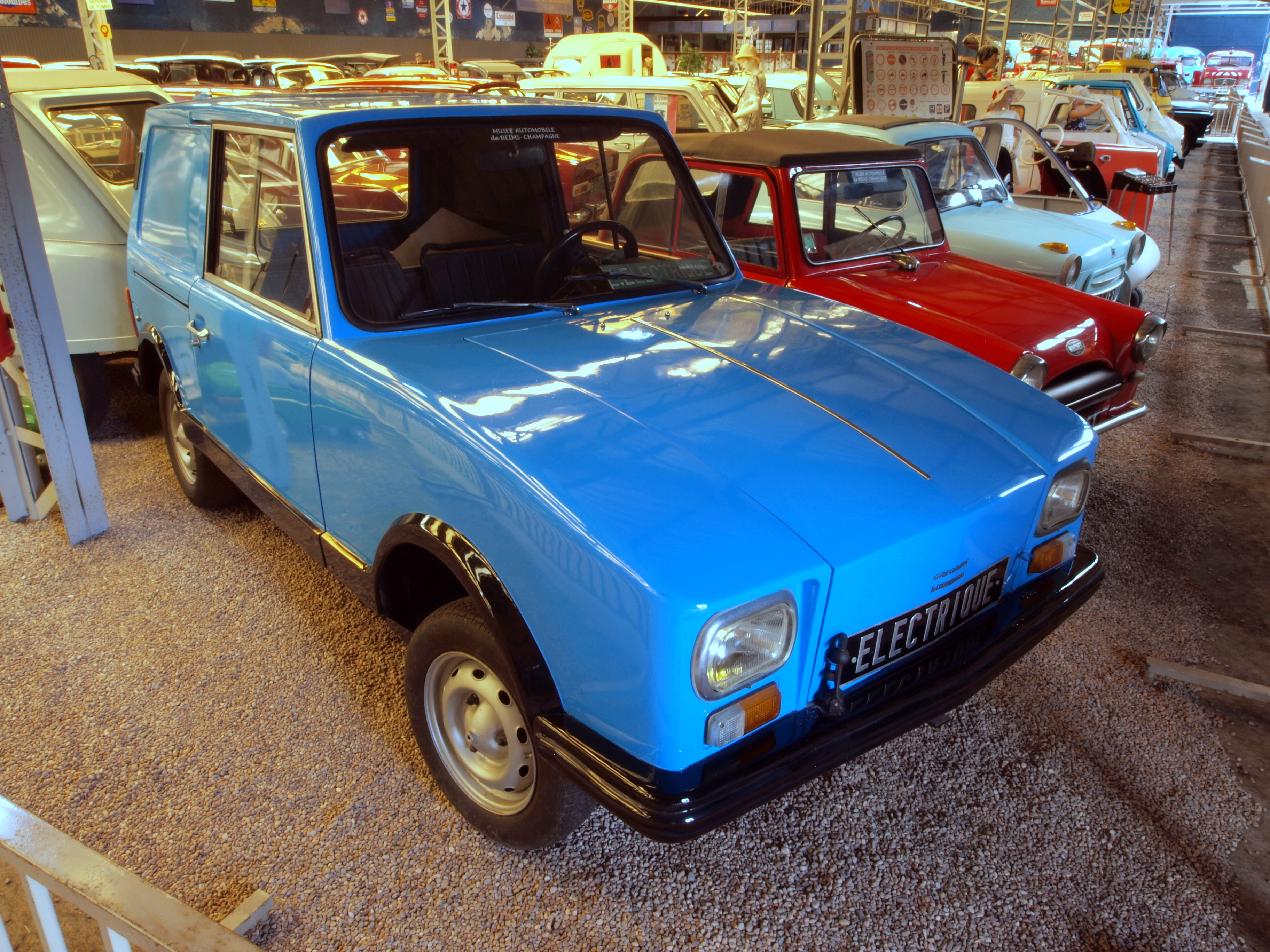 1969 Gregoire Charbonneaux